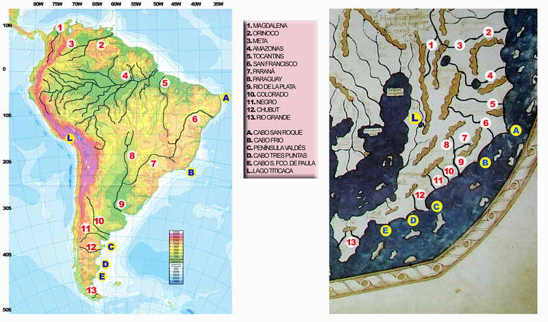 Principales rios, lagos, entrantes y salientes costeras de Sudamérica, identificados en la Cola de Dragón, de acuerdo a la imagen original de Paul Gallez. [la presente a color corresponde a una recreación del autor ibicenco Nito Verdera (vid: Cristobal Colon de Ibiza]